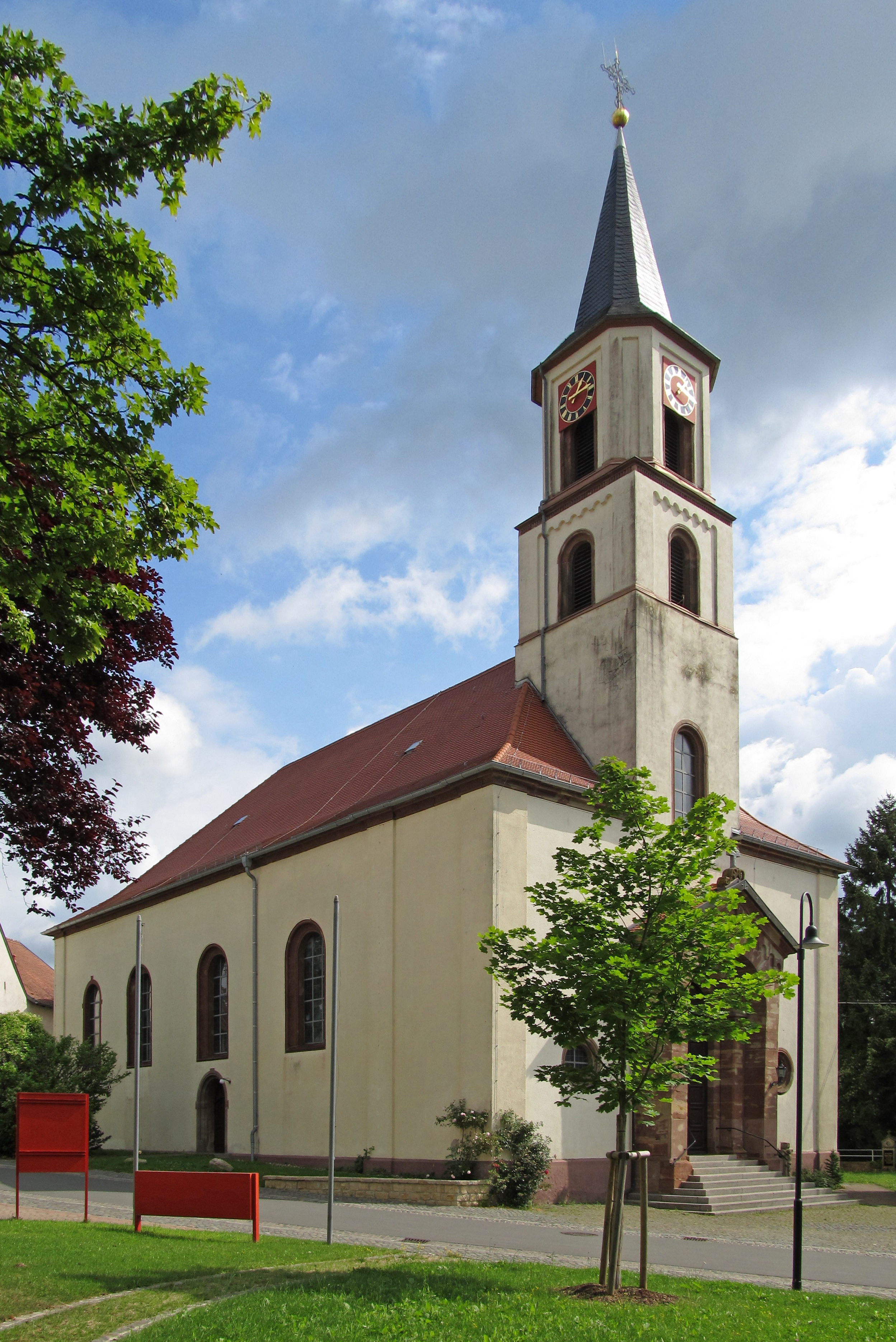 Die katholische Pfarrkirche St. Alban in Gersheim, Saarland